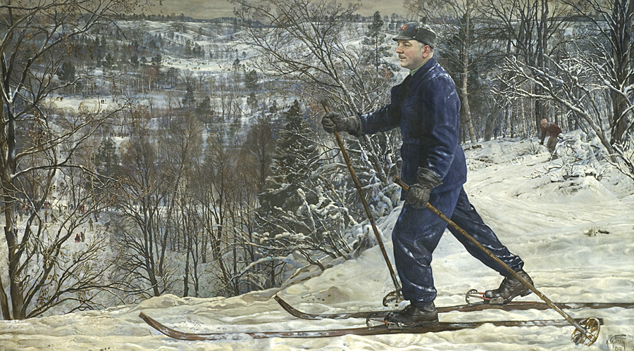 Voroshilov on ski walklabel QS:Lru,"К. Ворошилов на лыжной прогулке" label QS:Len,"Voroshilov on ski walk"